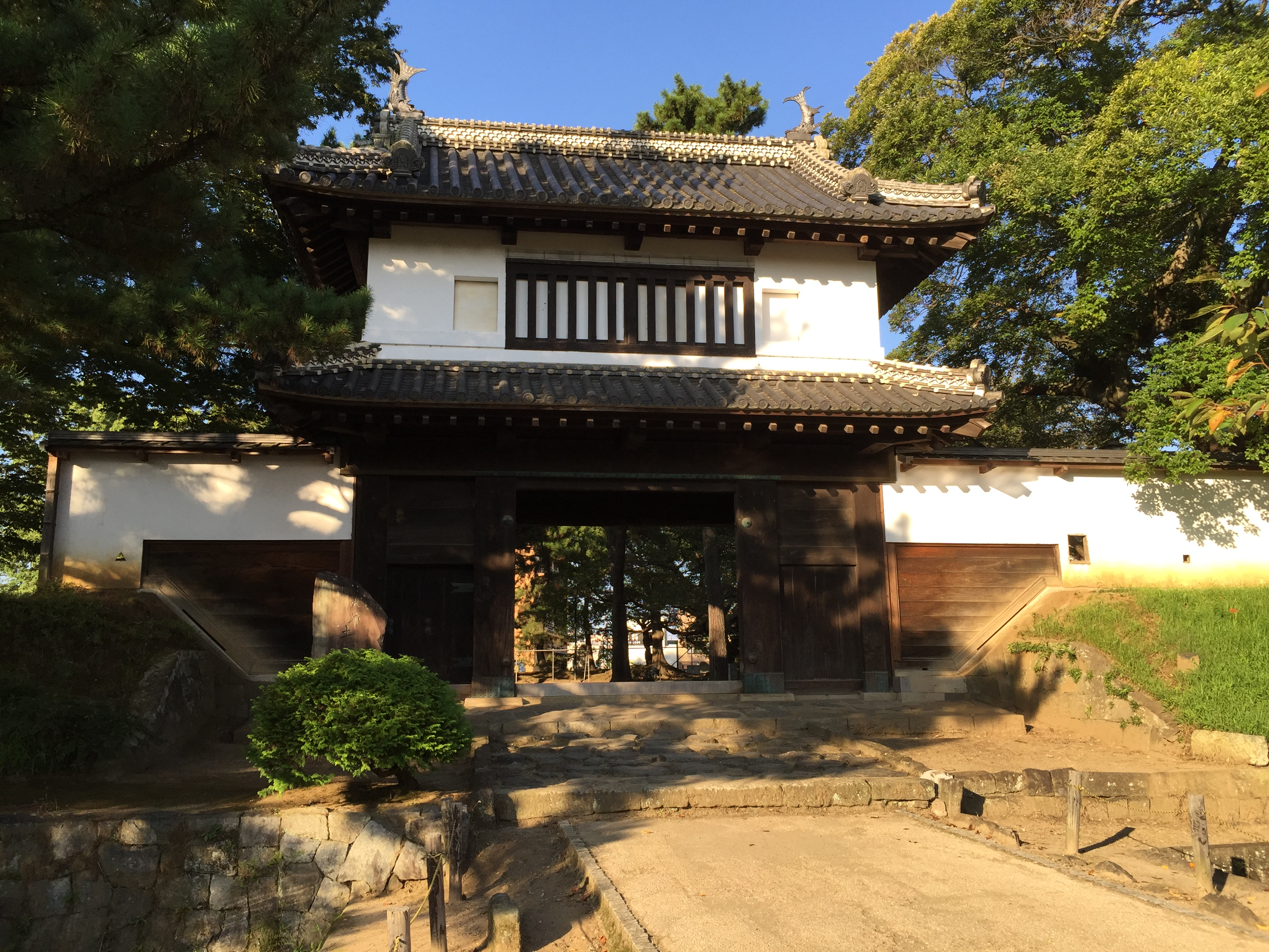 土浦城 城門